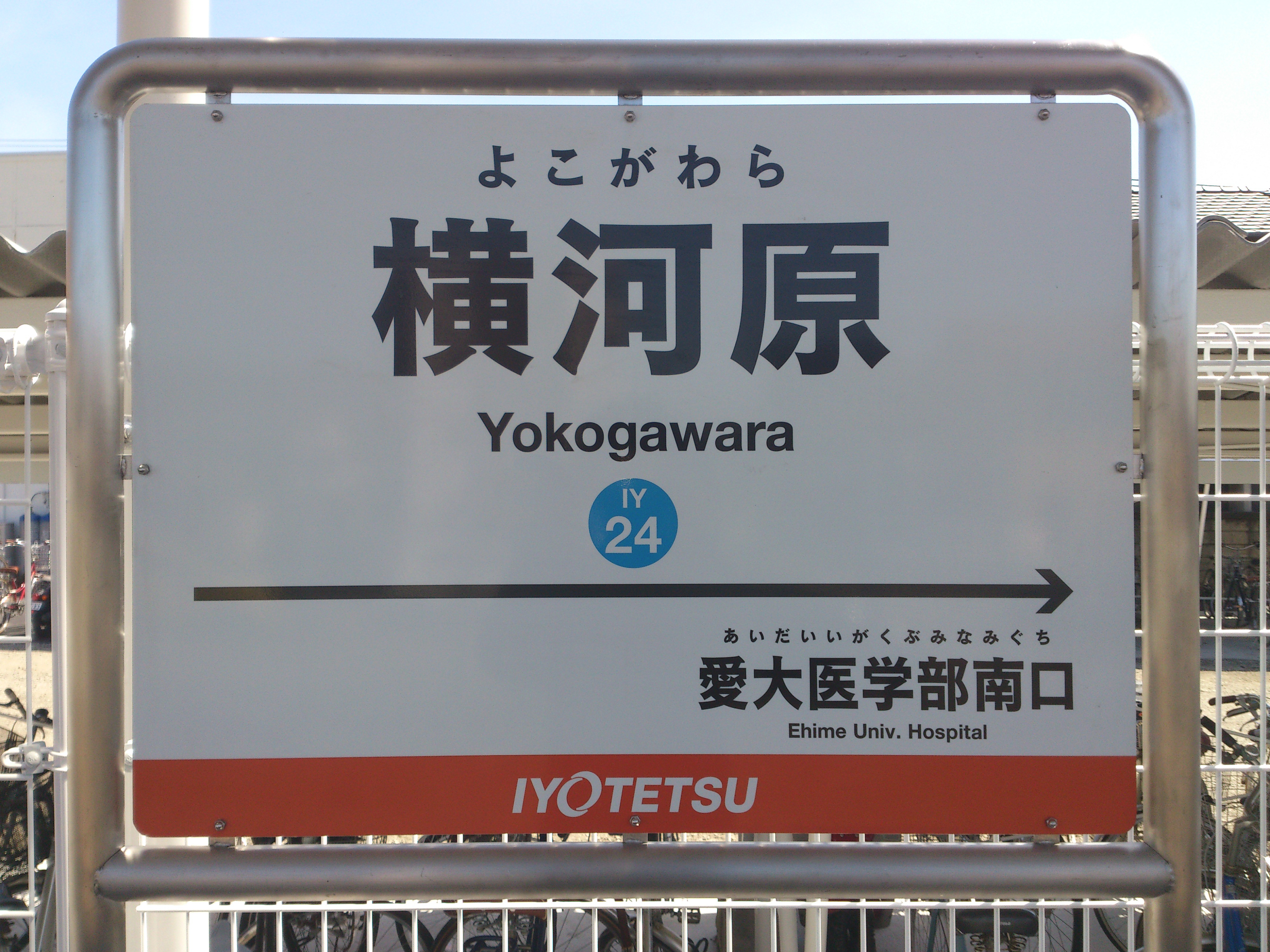 伊予鉄道、横河原駅の駅名標です。